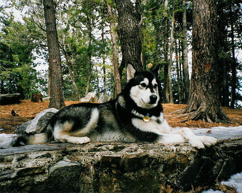 Imagen de un Alaska Malamute Foto de un alaska malamute. Foto realizada por sakowitz y compartida en flickr, en esta dirección